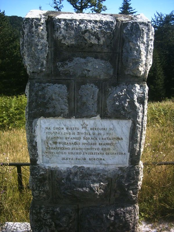 Споменик на Солилима на планини Борја код Теслића